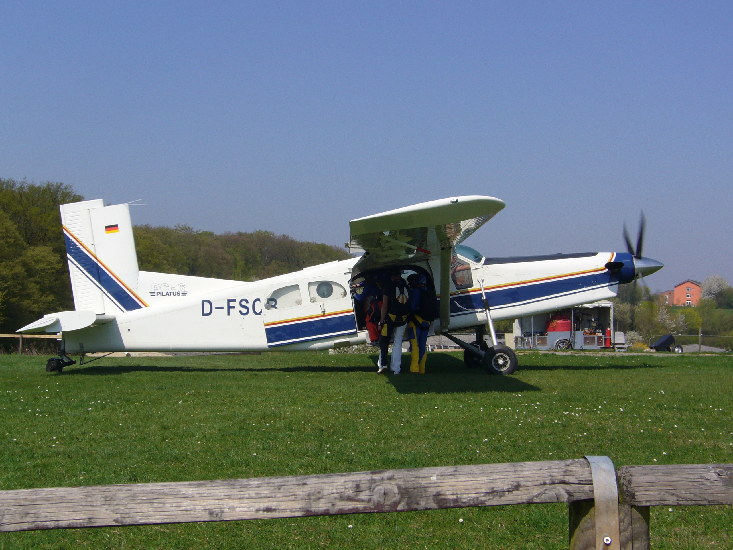 Eine Pilatus Porter PC-6 in Bruchsal auf dem Fallschirmsprungplatz der 1.LLDiv. e.V. Bruchsal. Gerade steigen Fallschirmspringer zum Absetzflug ein. Luftfahrzeugkennzeichen: D-FSCB; Turbine: Pratt & Whitney Canada PT6A-34 mit 750 PS; Propeller: Hartcell HC-D4N-3P